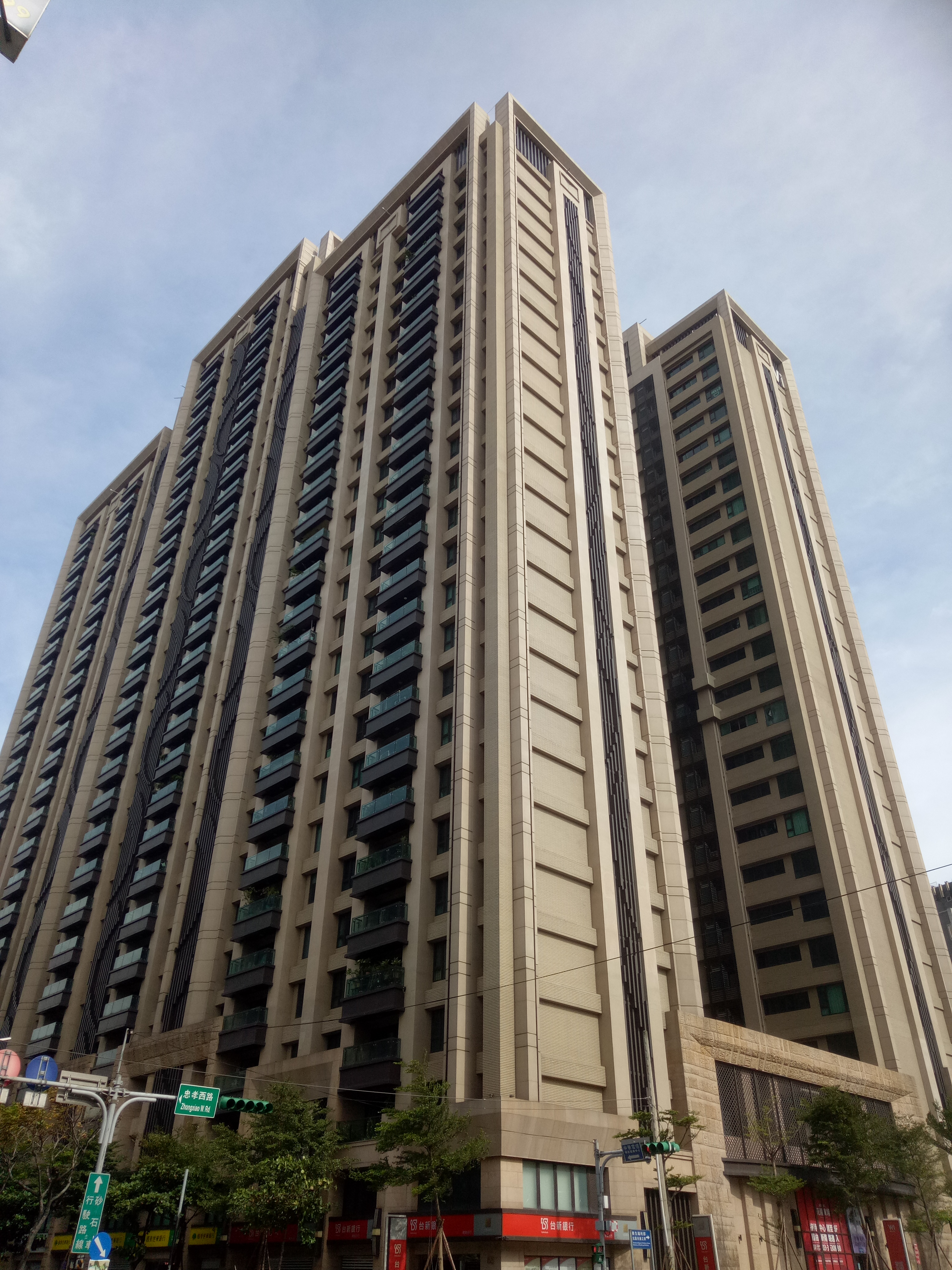 麗寶W1，為桃園市蘆竹區的高層住宅大樓。